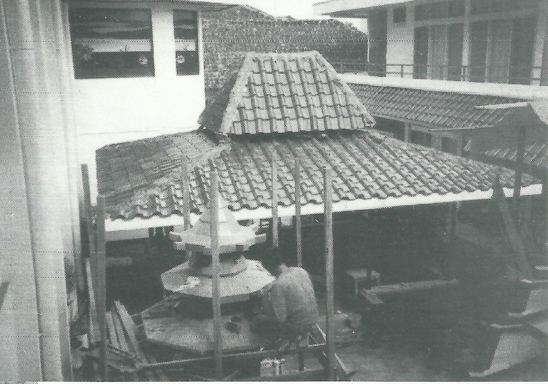 Sentuhan akhir dalam pembangunan pendopo dan pagoda.